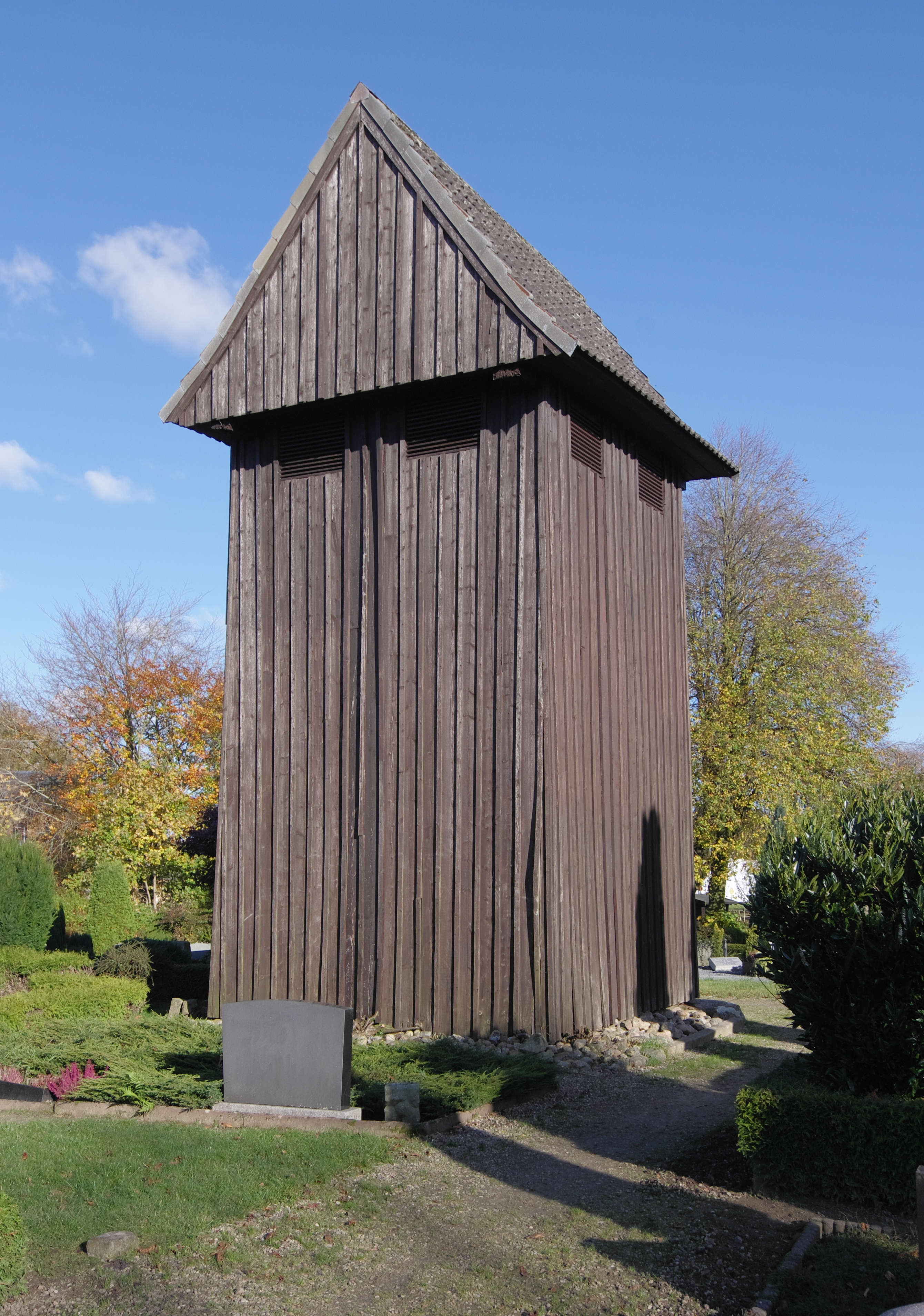 Denkmalgeschütztes Kirche in Nübel, Kreis Schleswig-Flensburg. Glockenstapel.